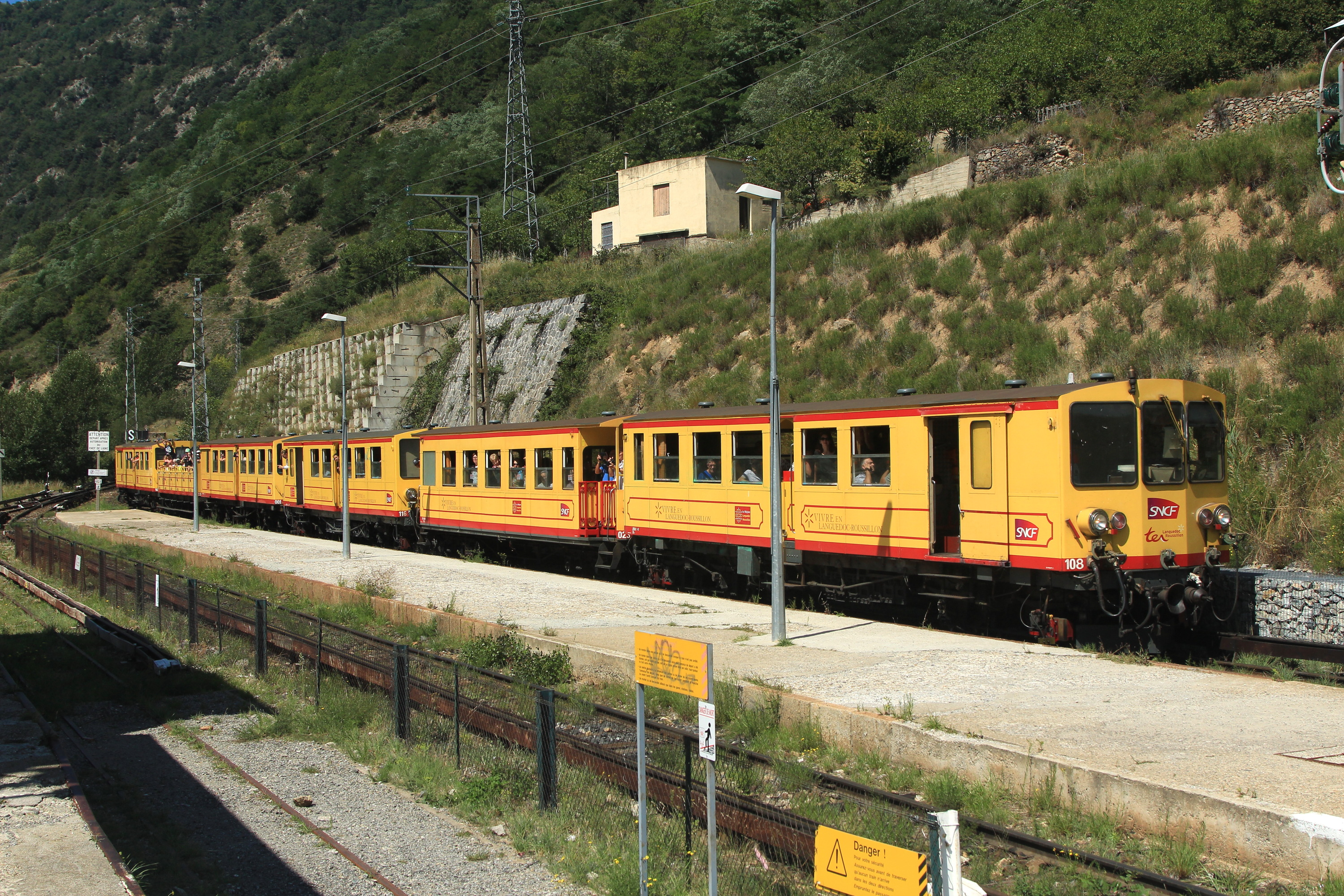 Le train jaune composé des éléments Z108-ZRBX20023-Z116-ZRBq20001-ZRBX20030-Z109 arrive en gare de Fontpédrouse-St-Thomas-les-Bains.